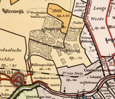 polder Sluipwijk